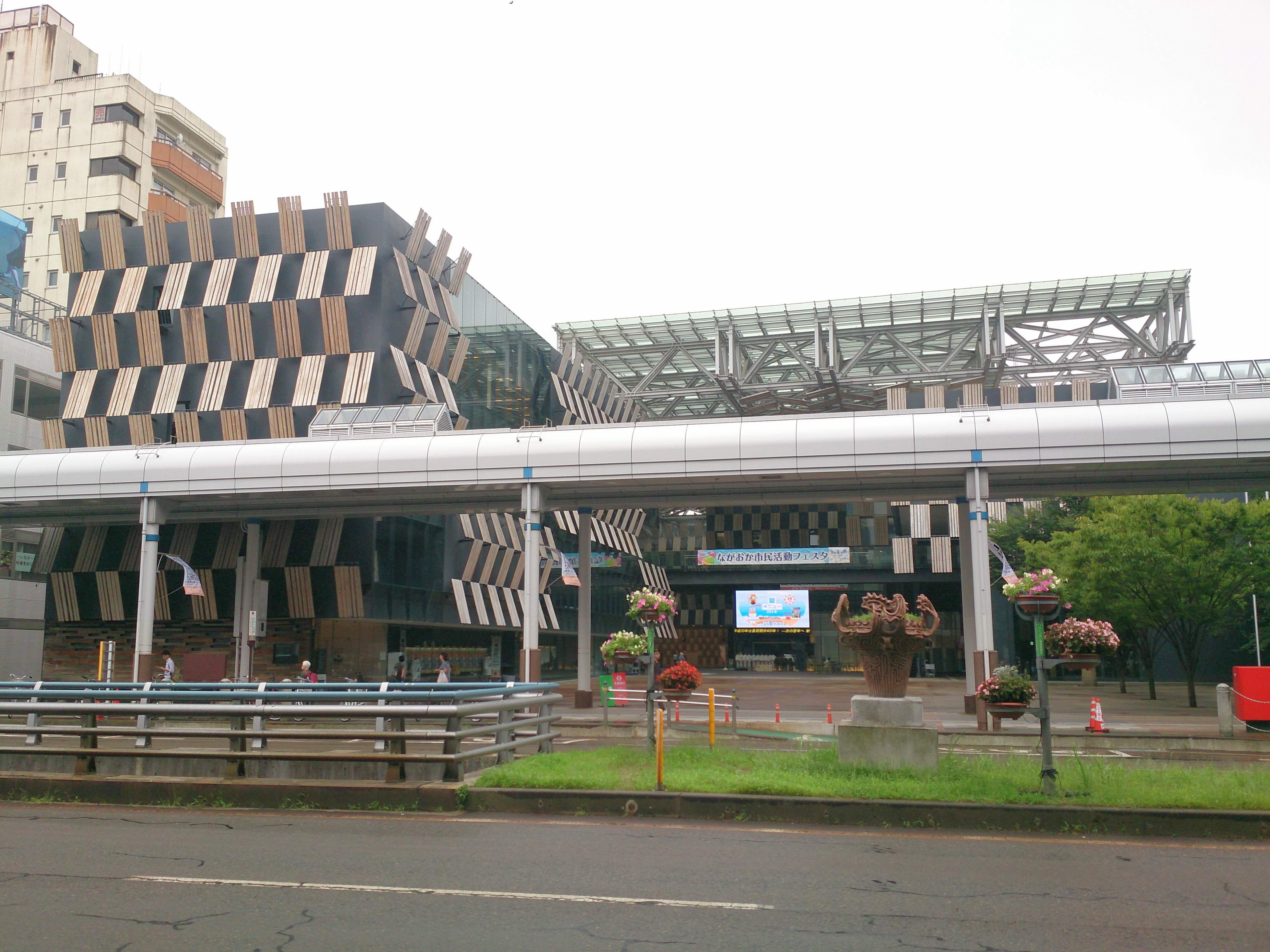 アオーレ長岡全景